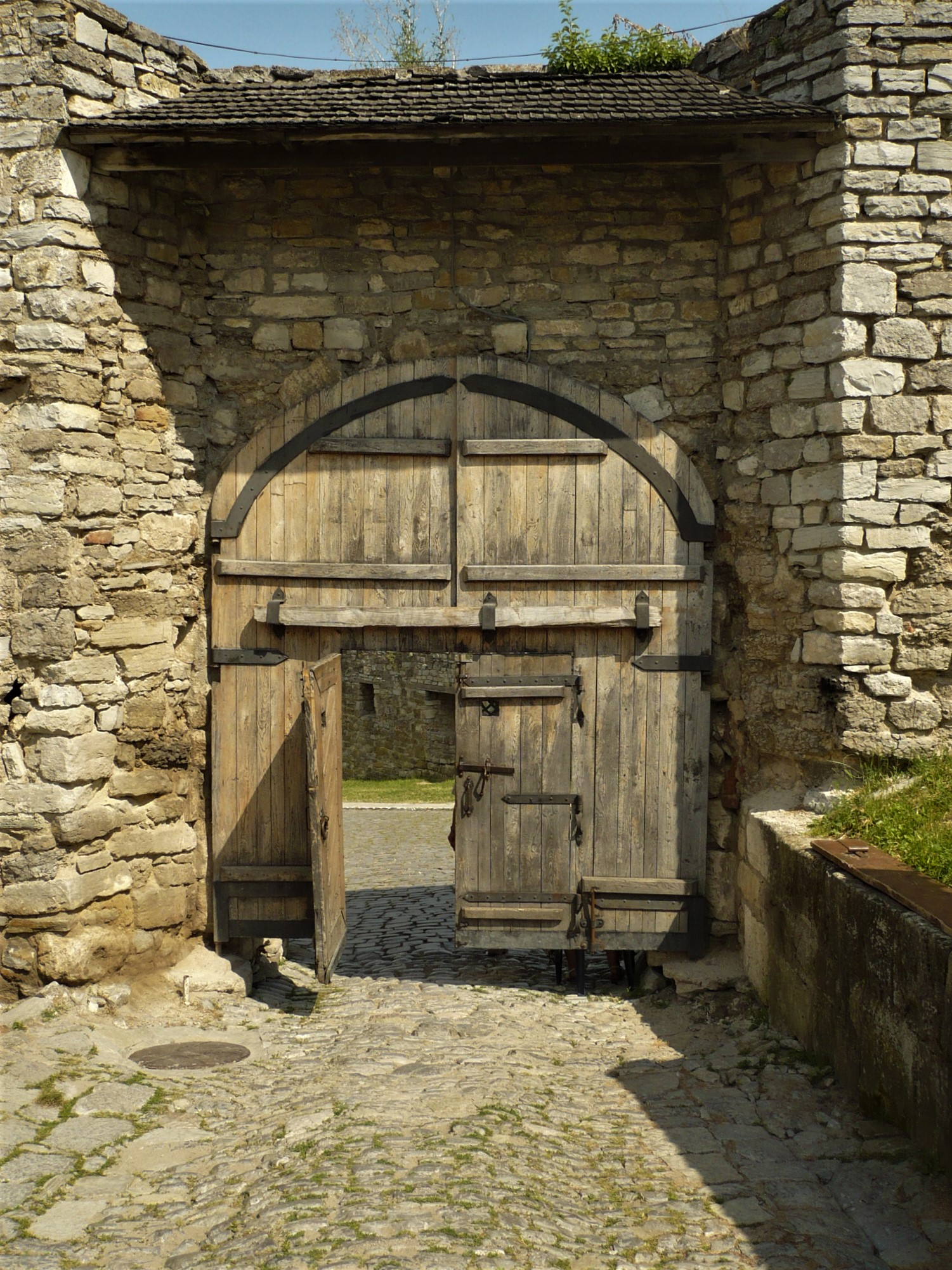 Zamek w Kamiencu Podolskim. Brama